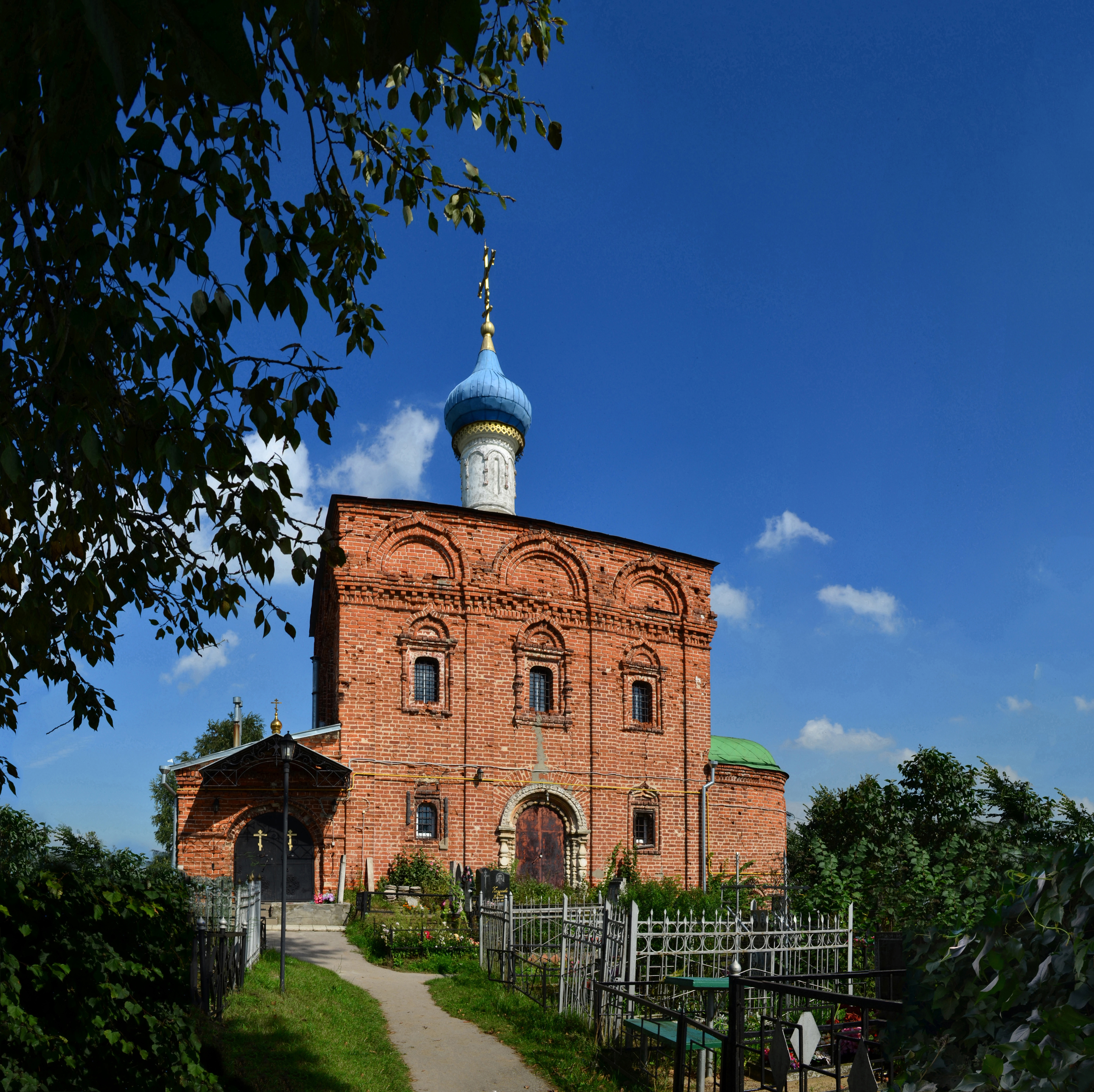 Рязань.Борки.Храм Богоявления.15 век.